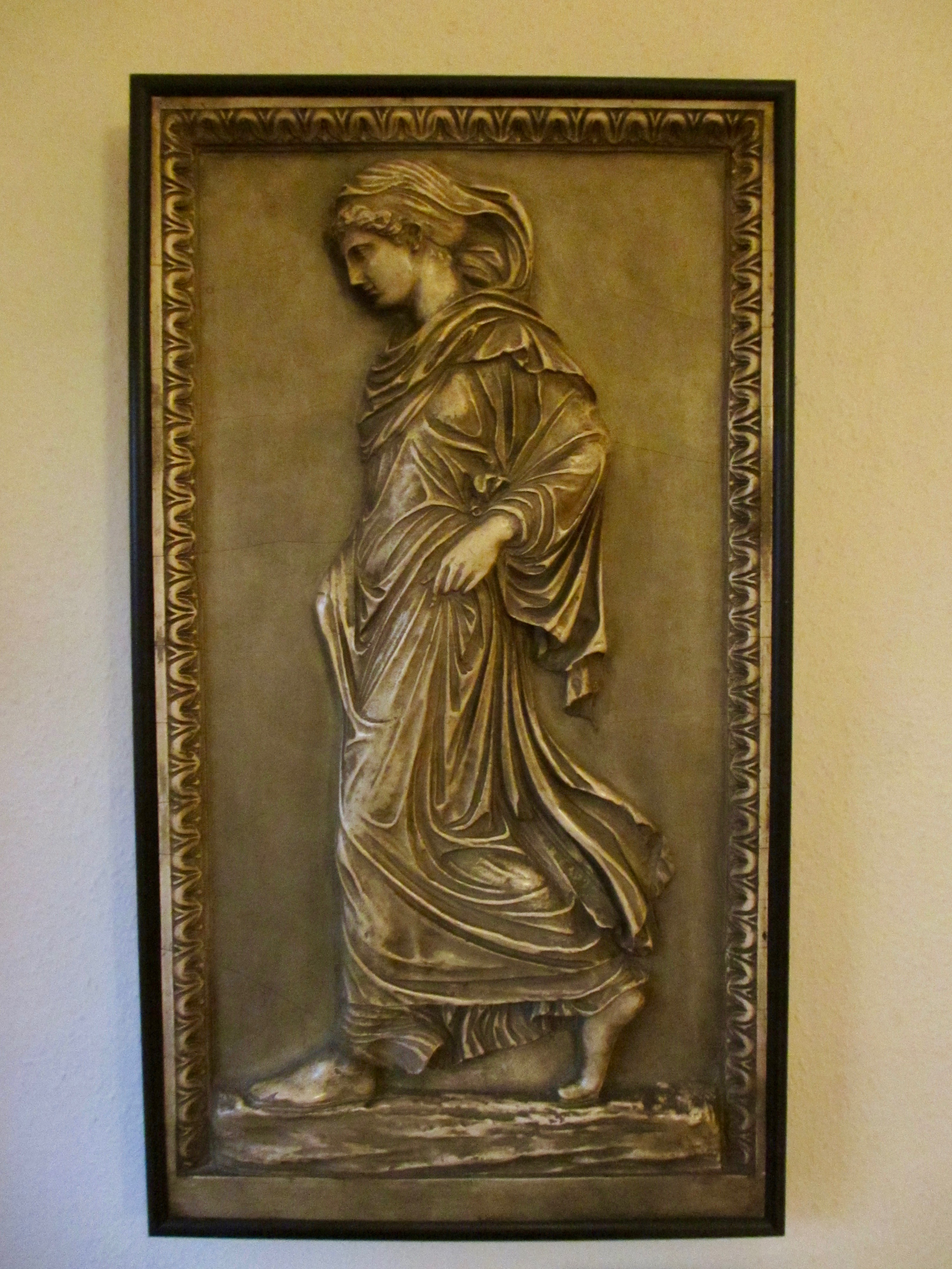 Gradiva - Freud Museum London (Sigmund Freud, Der Wahn und die Träume in W. Jensen's Gradiva